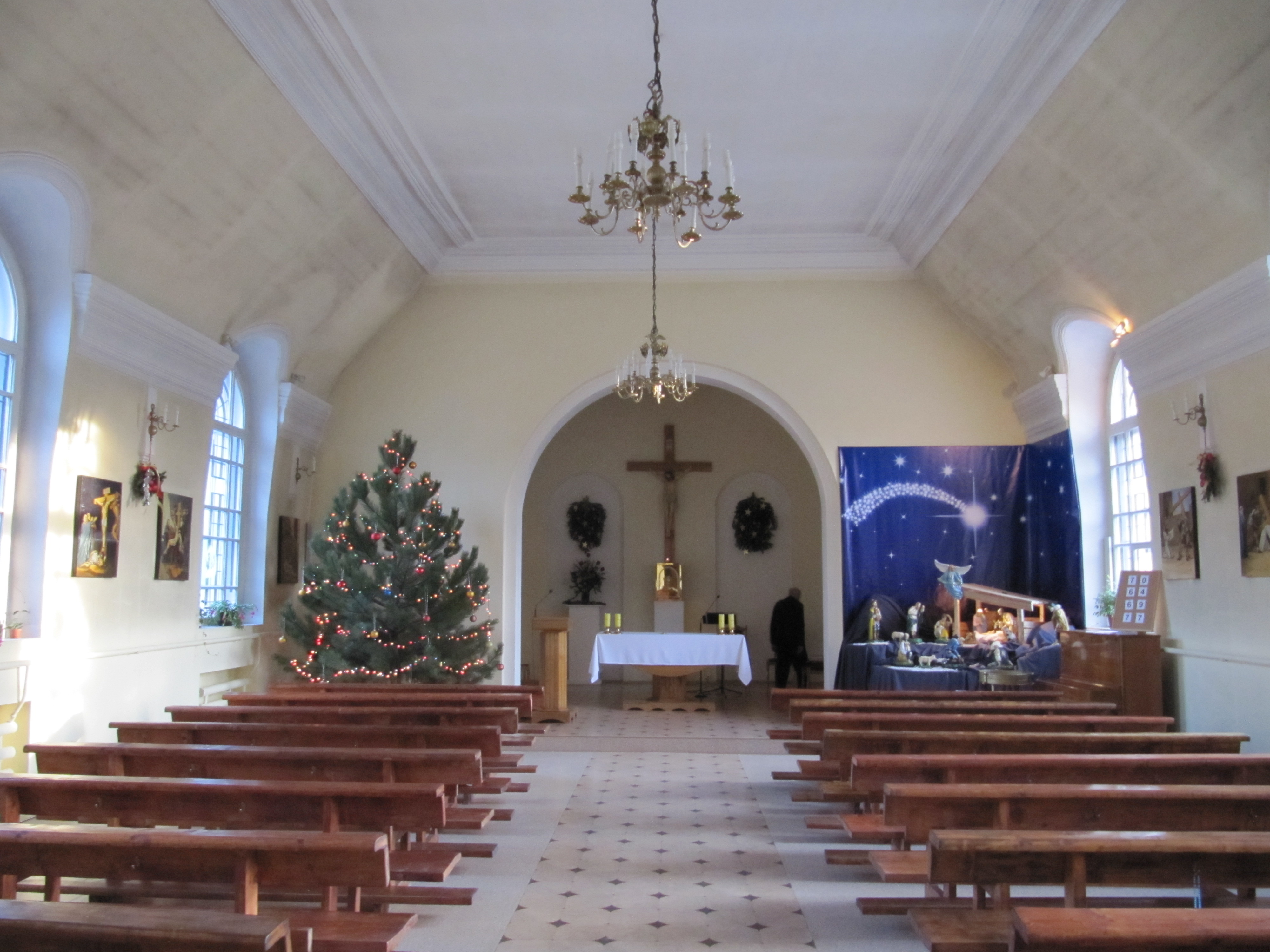 Внутри католического храма Пресвятой Богородицы, Новочеркасск